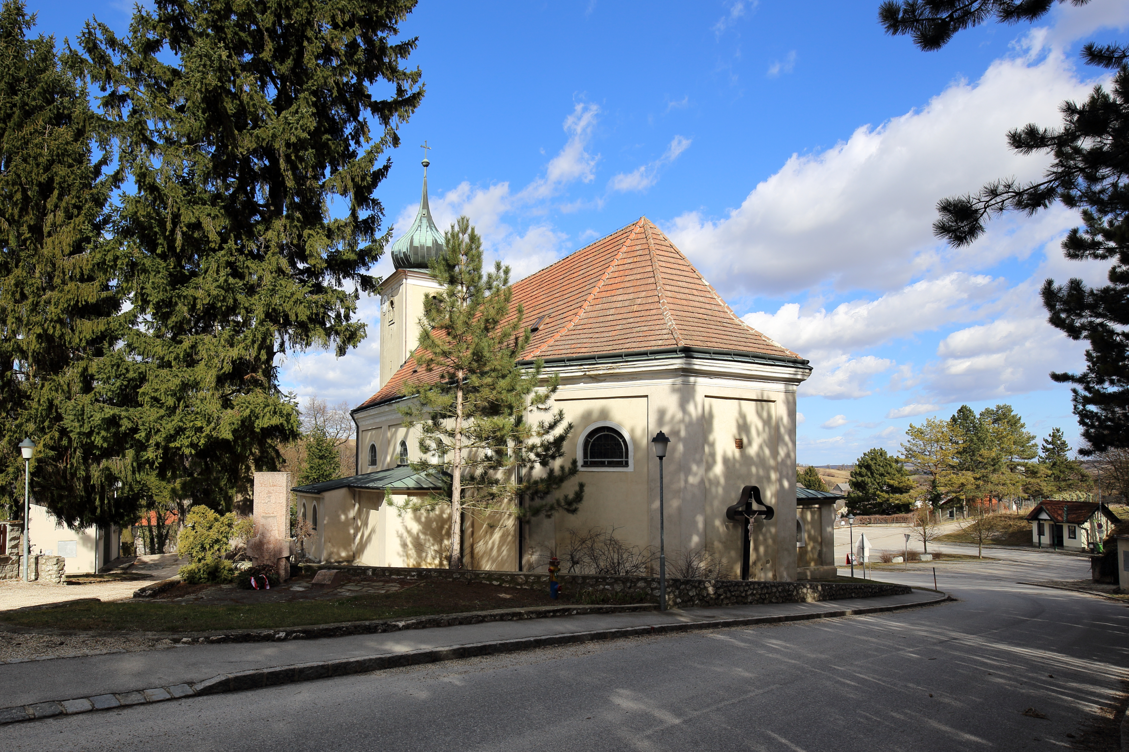 Südwestansicht der katholischen Pfarrkirche hl. Peter in Schleinbach, ein Ortsteil der niederösterreichischen Marktgemeinde Ulrichskirchen-Schleinbach. Ein barocker Sakralbau aus dem Jahr 1687 mit vermutlich mittelalterlichem Kern. Der gotische Nordturm wurde 1436 errichtet.